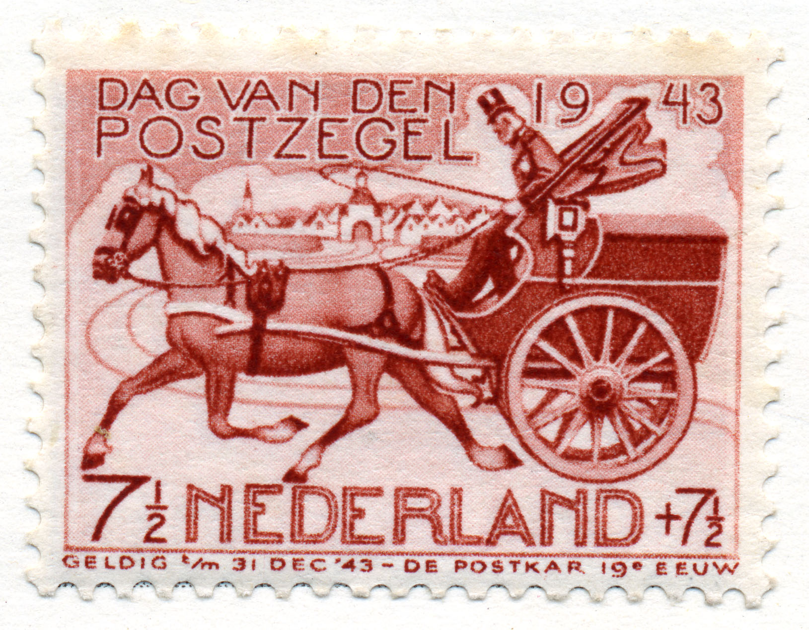 Postkoets (1943). Dag van de postzegel. Ontwerper Jan Strube